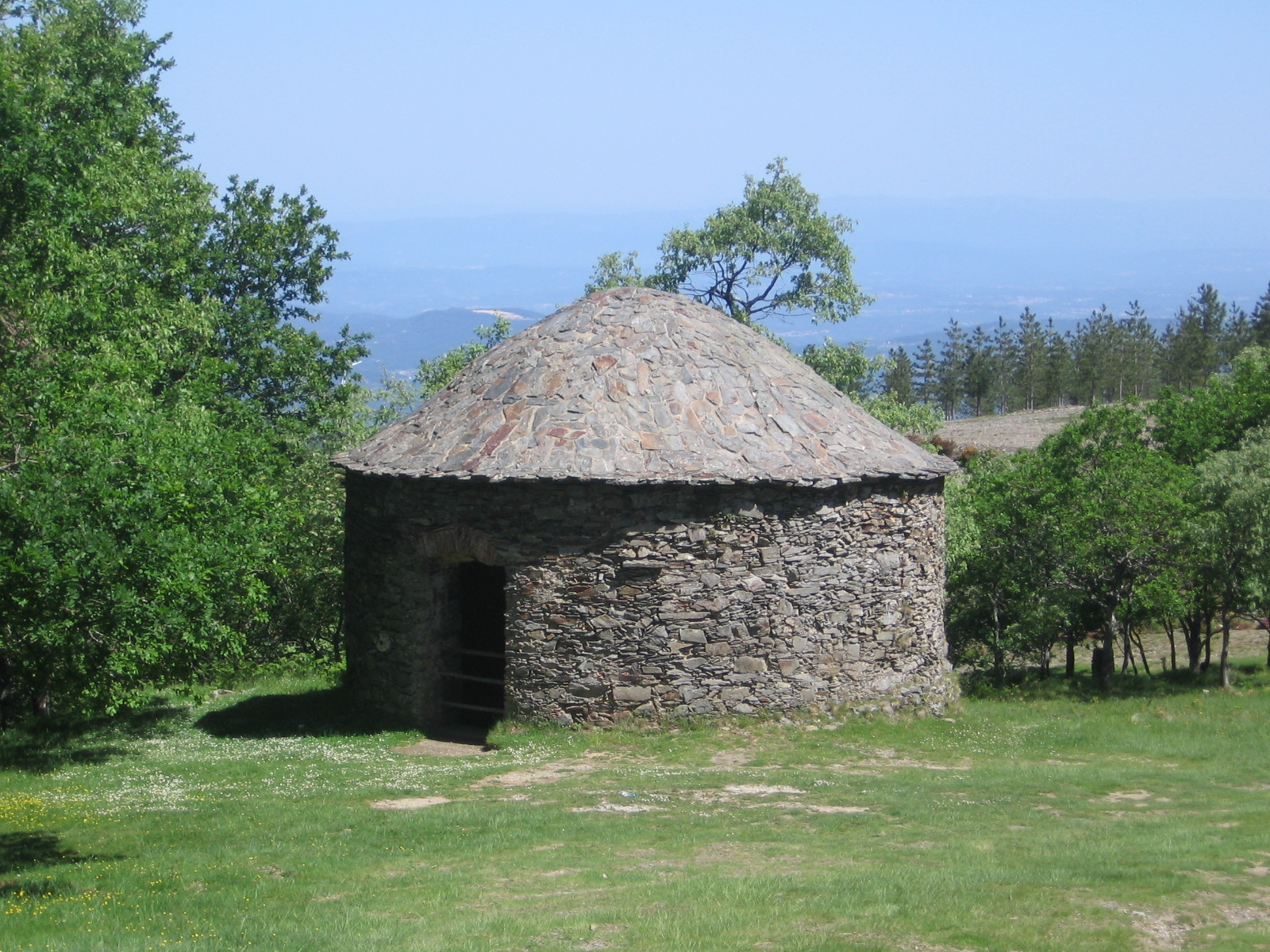 Antigo poço de neve. Serra da Lousã. Coentral. Portugal